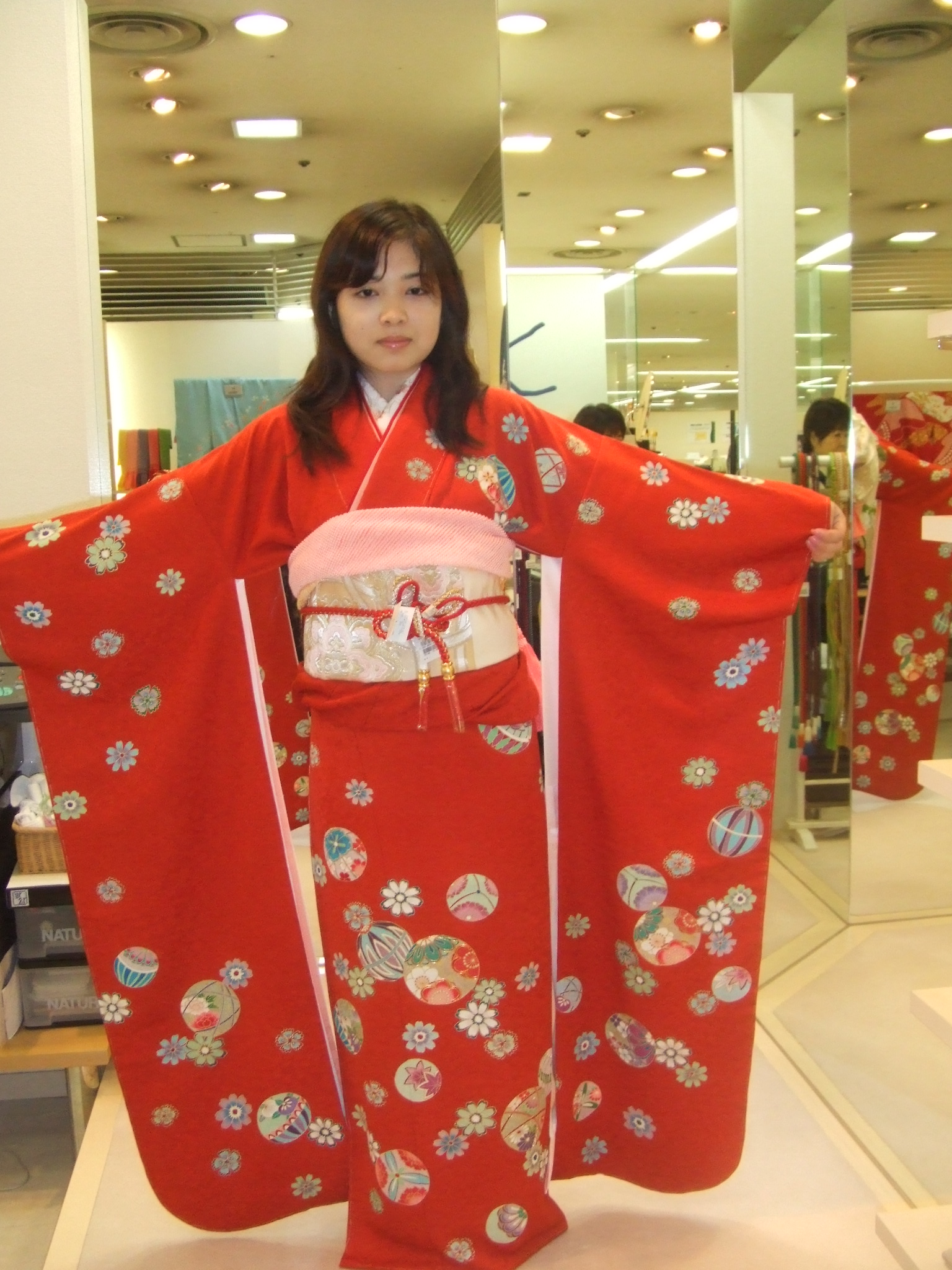 Furisode kimono